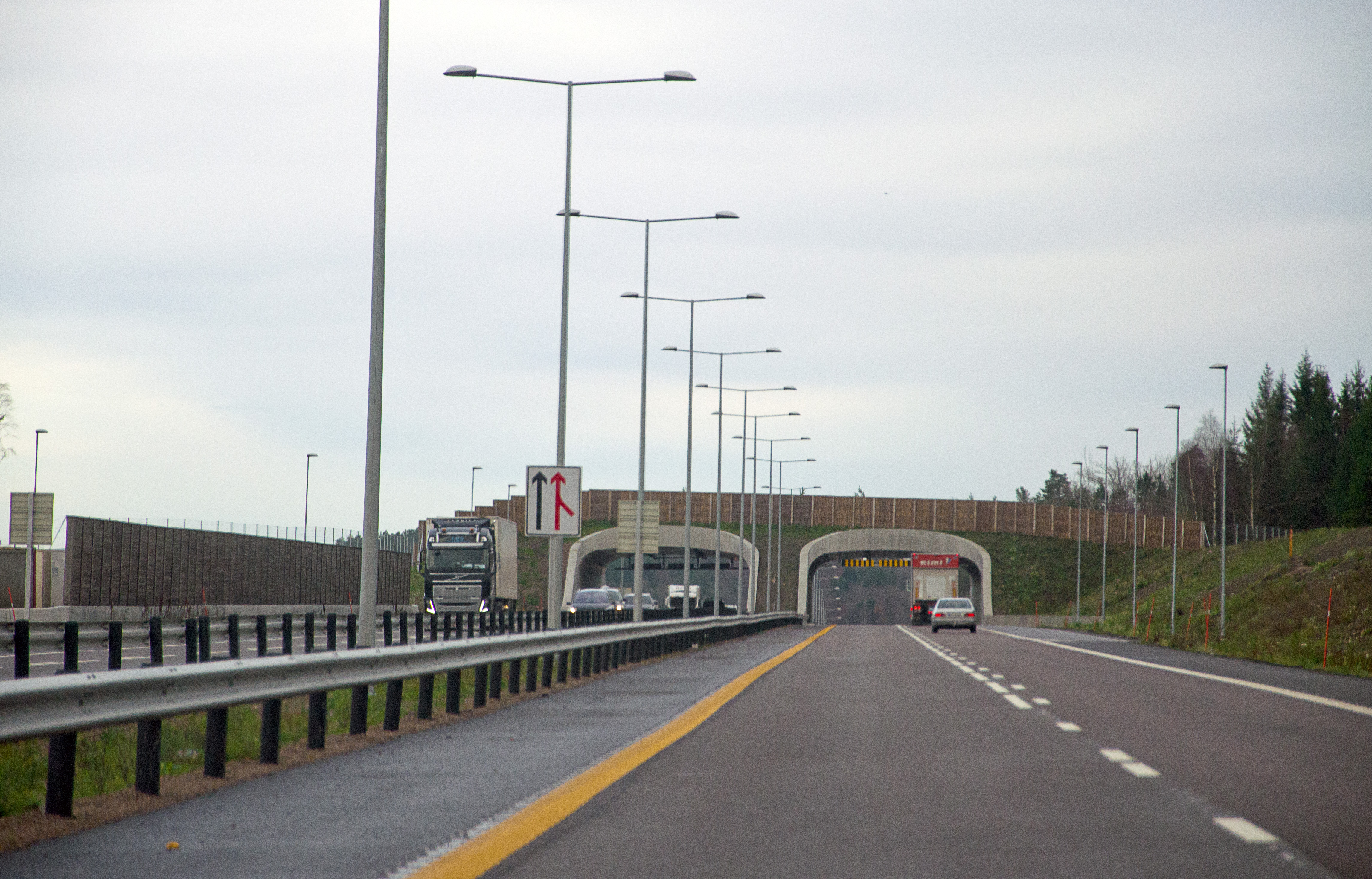 Ramsum viltlokk på E18 i Vestfold